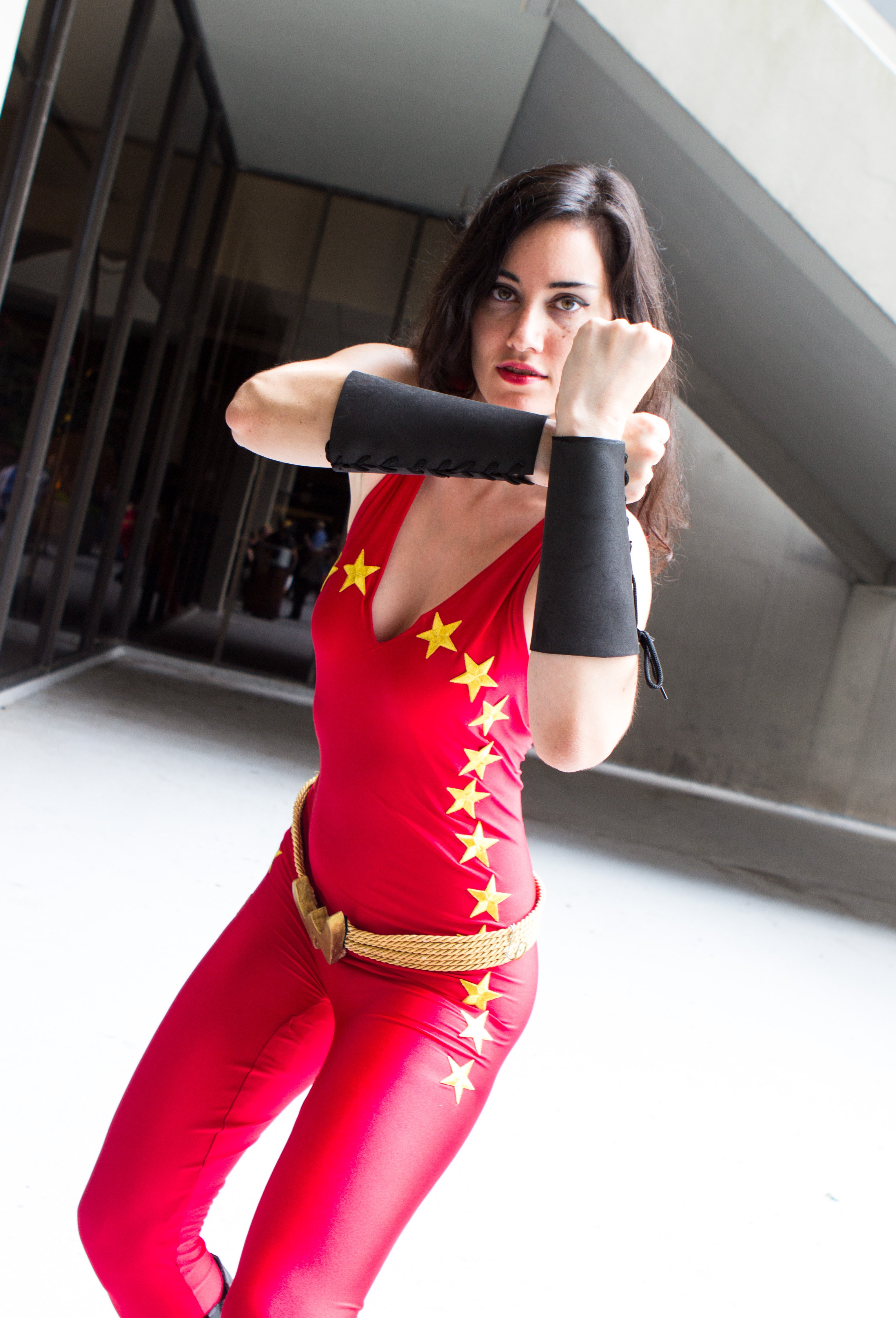 Donna Troy- Titans 2019